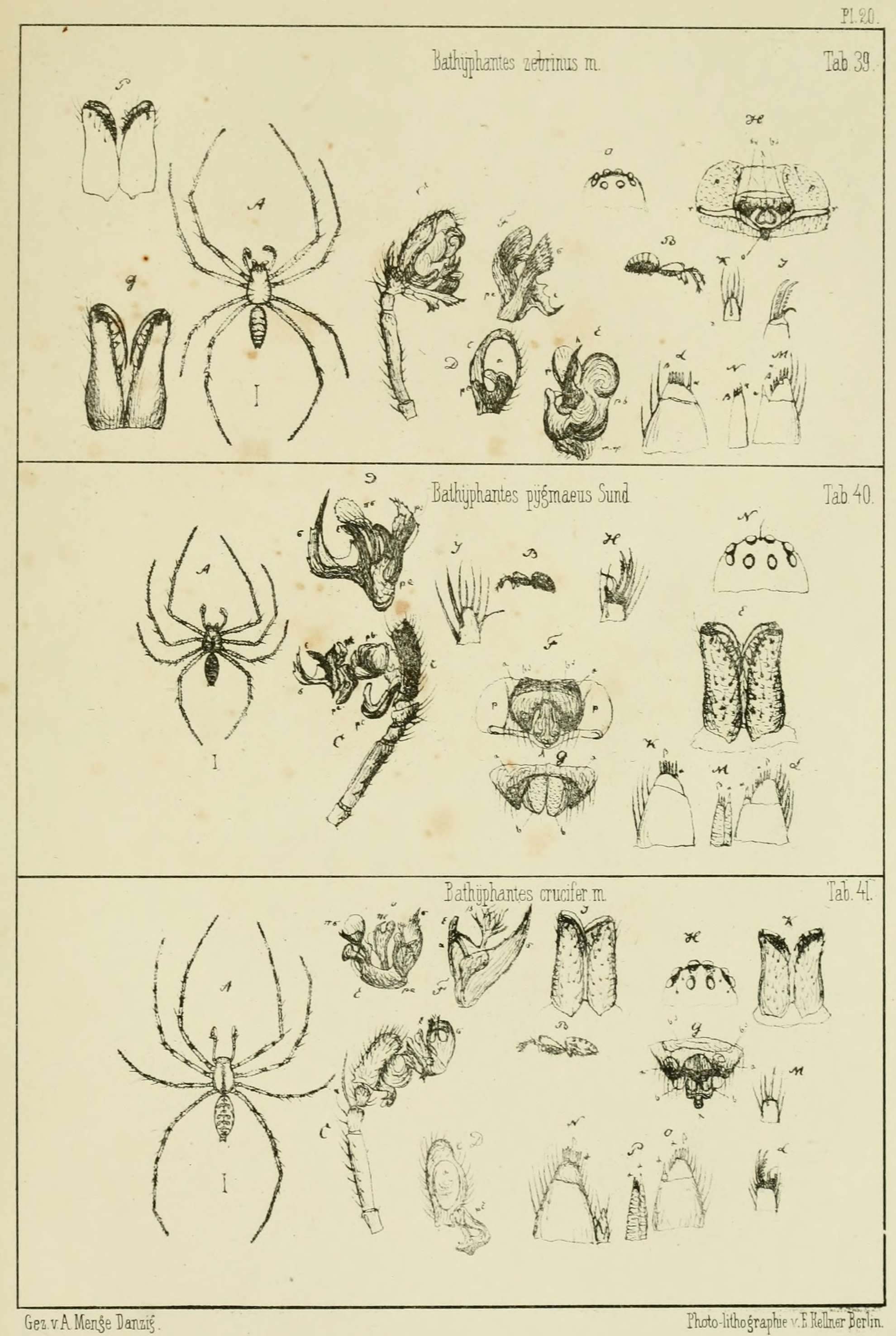 Anton Menge: Preussische Spinnen. I. Abtheilung. Tafel 20 - 39. Bathyphantes zebrinus m. 40. Bathyphantes pygmaeus Sund. 41. Bathyphantes crucifer m.. In: Schriften der Naturforschenden Gesellschaft in Danzig. Erster Band drittes und viertes Heft. Druck von A. W. Kafemann, Danzig 1866